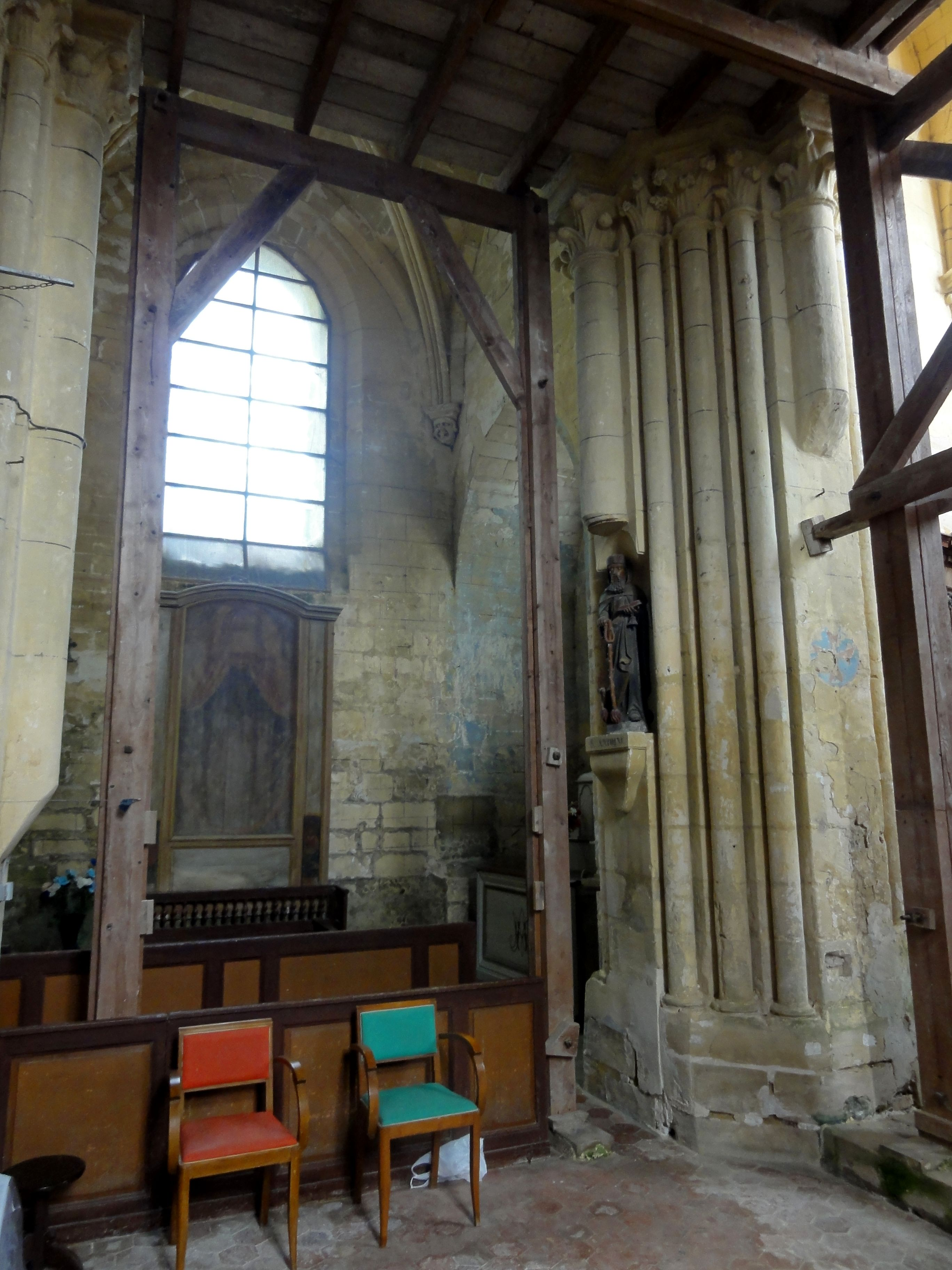 Croisée du transept, côté nord.